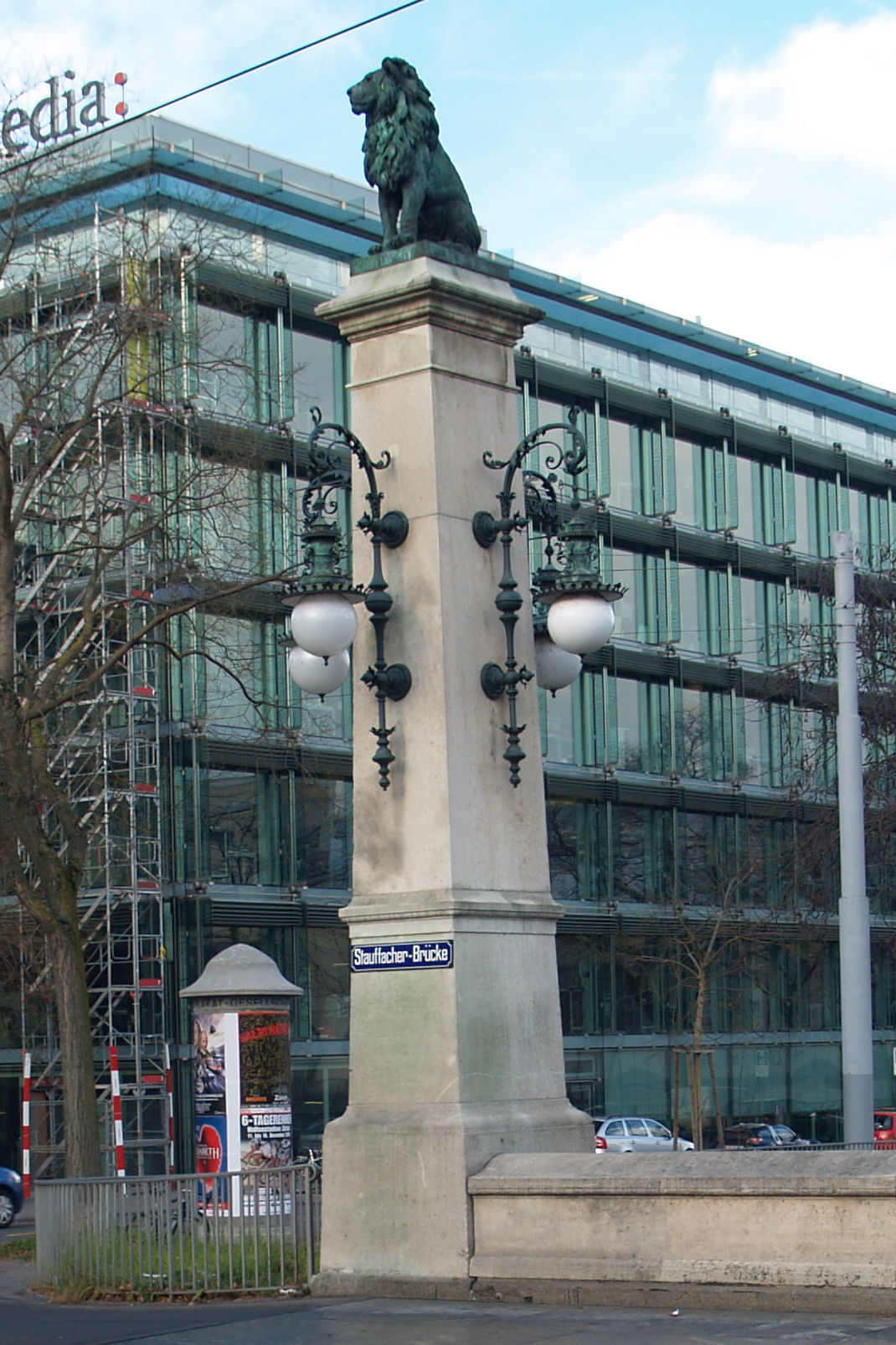 Einer der Eckpfeiler der Stauffacherbrücke über die Sihl in Zürich. Mit dem Bronze-Löwen vom Bildhauer Urs Eggenschwiler.